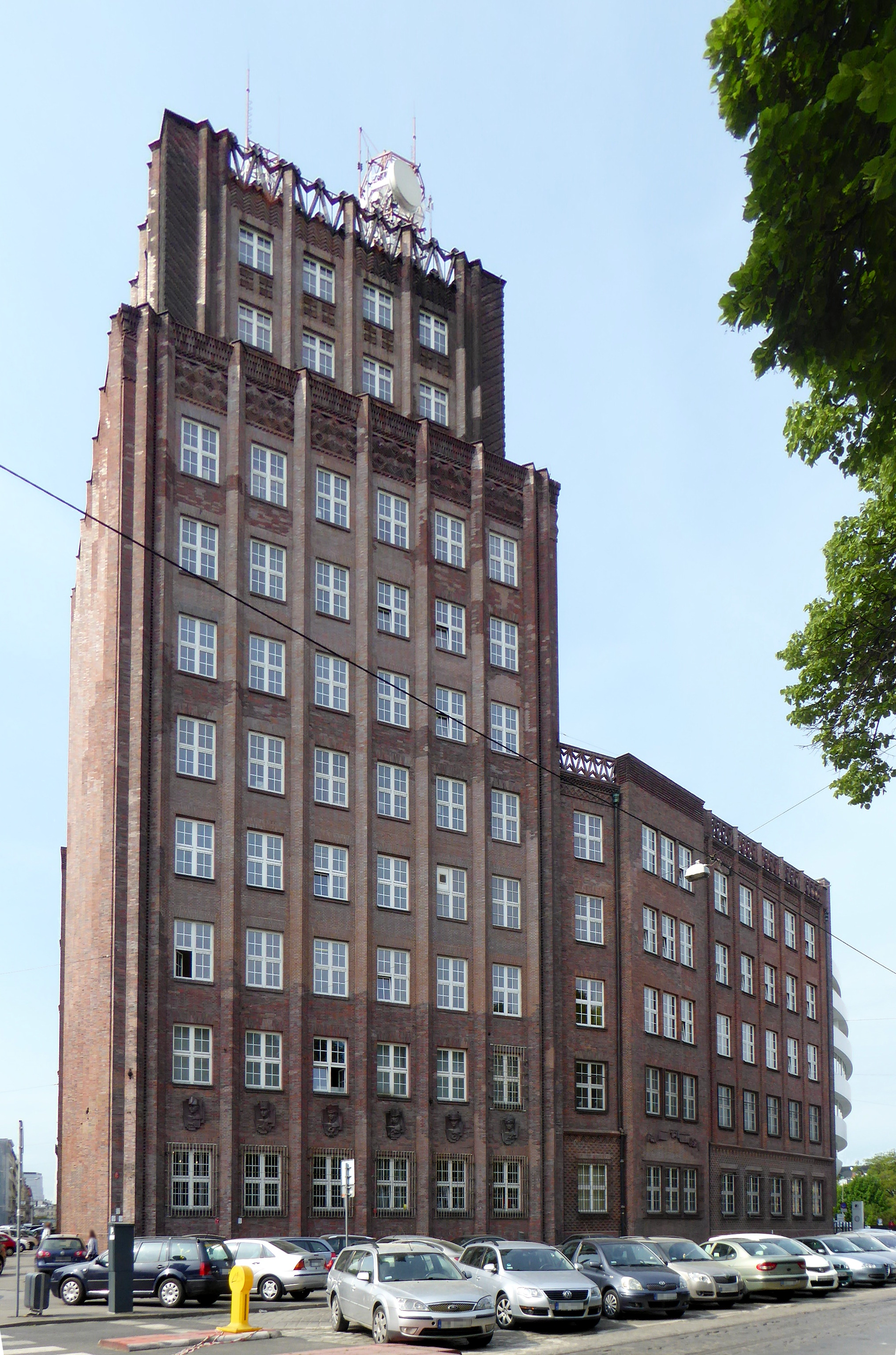 Breslau, ehemaliges Postscheckamt, jetzt Postmuseum.